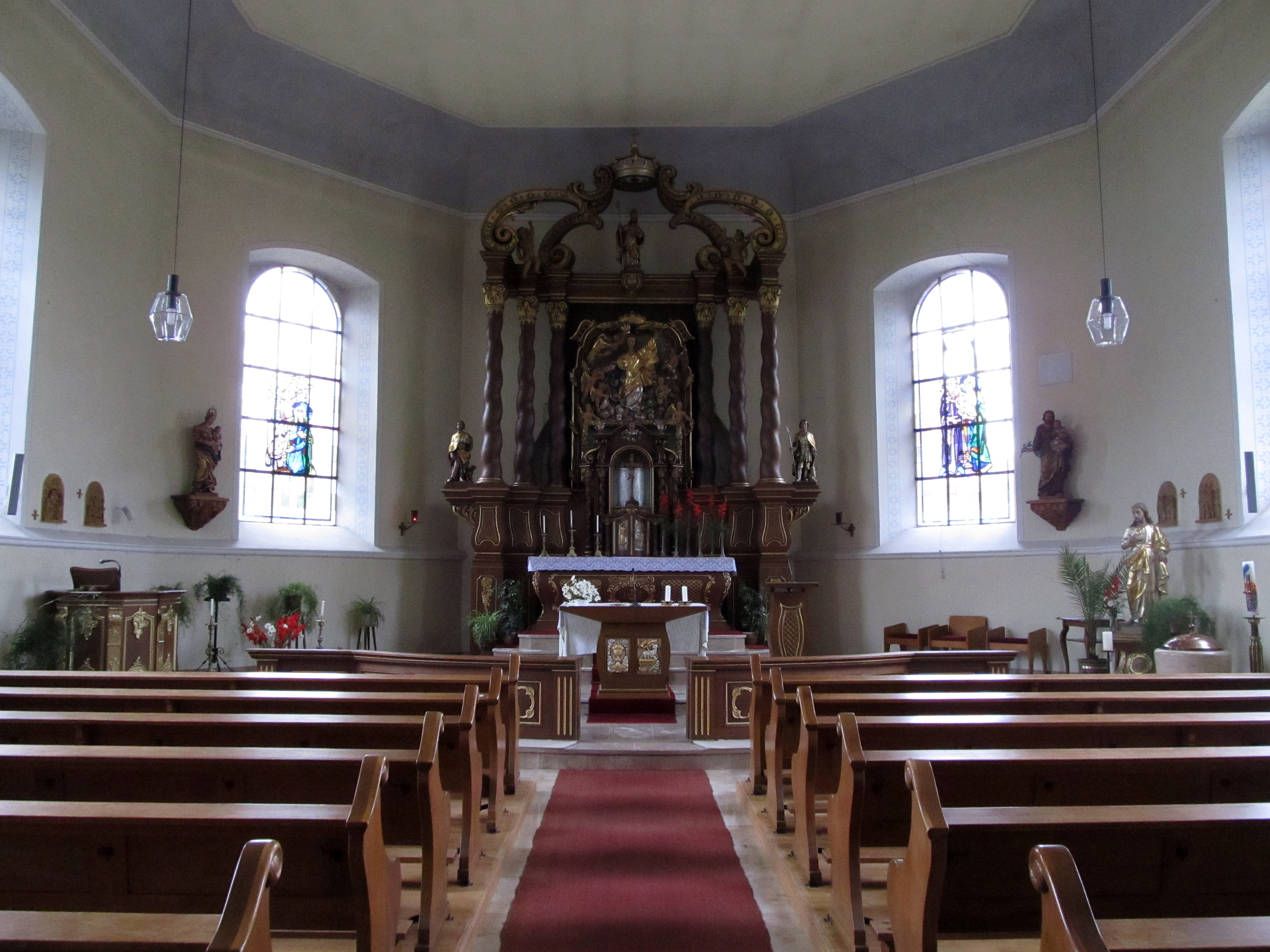 Blick ins Innere der katholischen Pfarrkirche St. Martin in Habkirchen, Gemeinde Mandelbachtal, Saarland